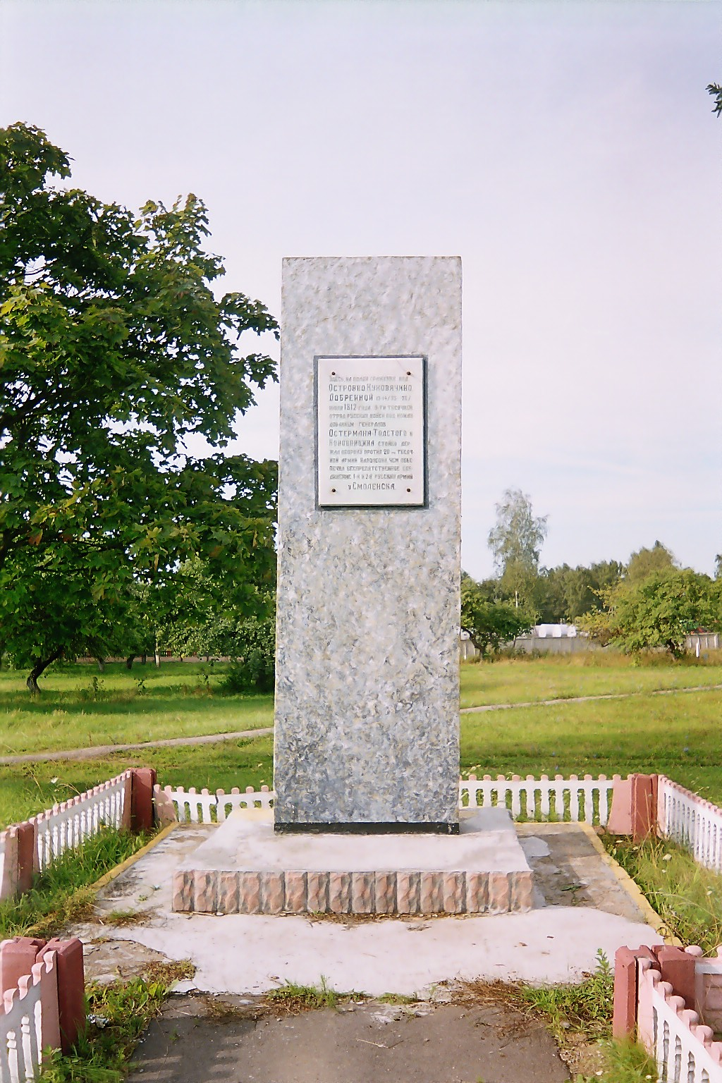 Обелиск установлен в память победы русской армии над армией Наполеона при Островно. Надпись на памятнике гласит: «Здесь, на полях сражений под Островно, Куковячино, Добрейкой 13-14/25-26/ июля 1812 года 9-тысячный отряд русских войск под командованием генералов Остермана-Толстого и Коновницына стойко держал оборону против 20-тысячной армии Наполеона, чем обеспечил беспрепятственное соединение 1-й и 2-й русских армий у Смоленска».